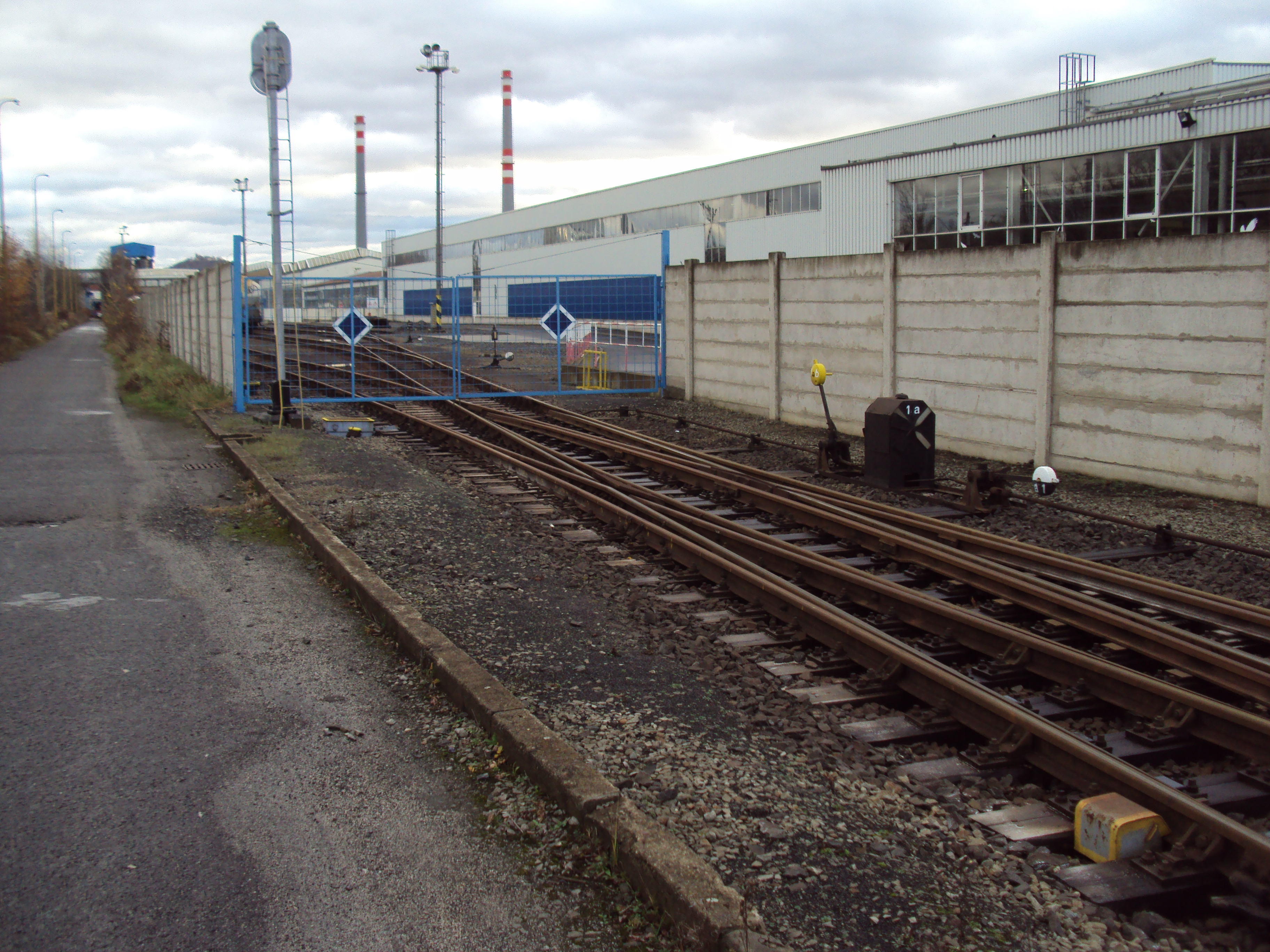 Železniční vlečka do sklárny AGC Teplice - Řetenice, napojena na trať 130